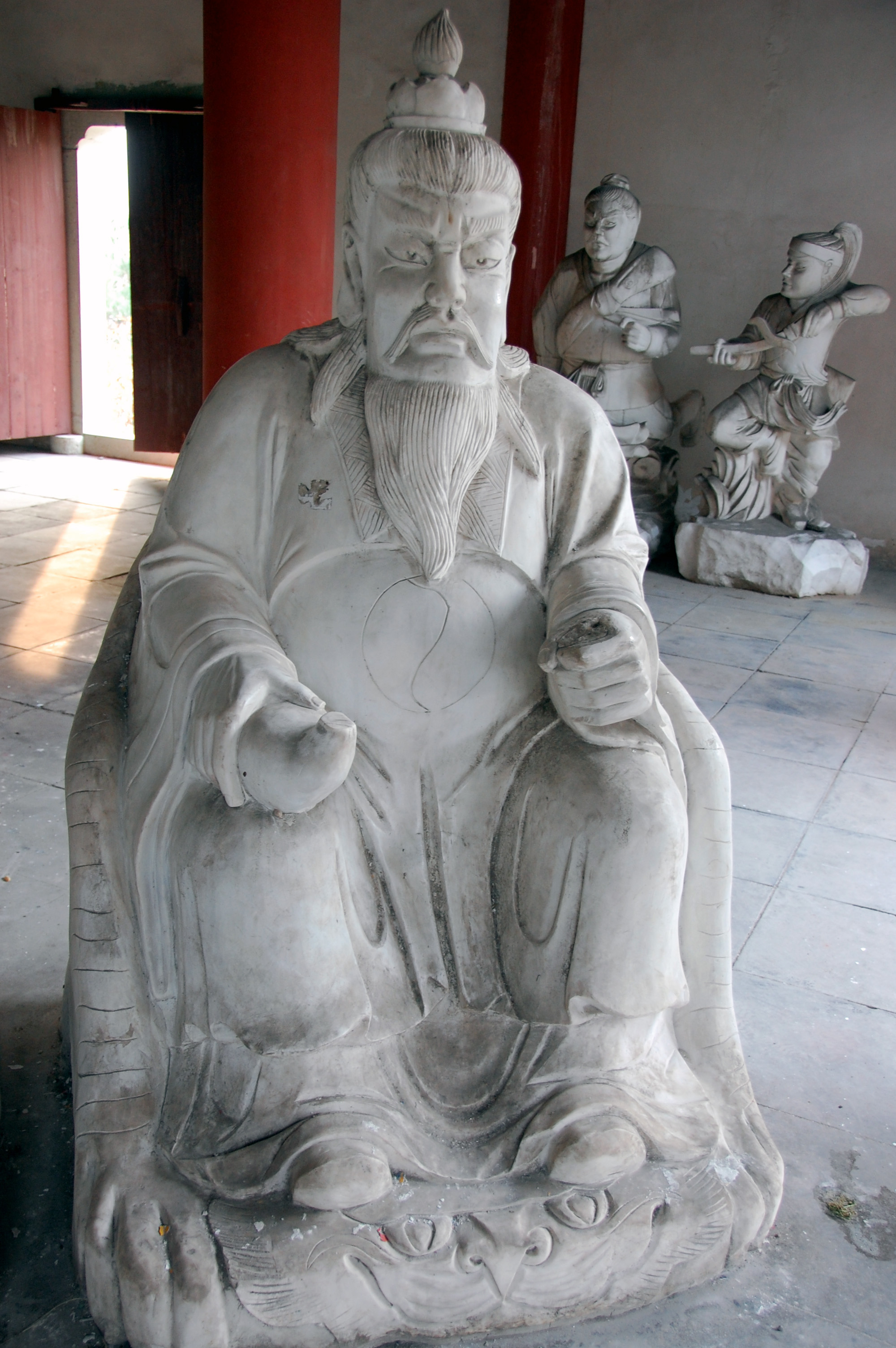 清明上河図/清明上河图